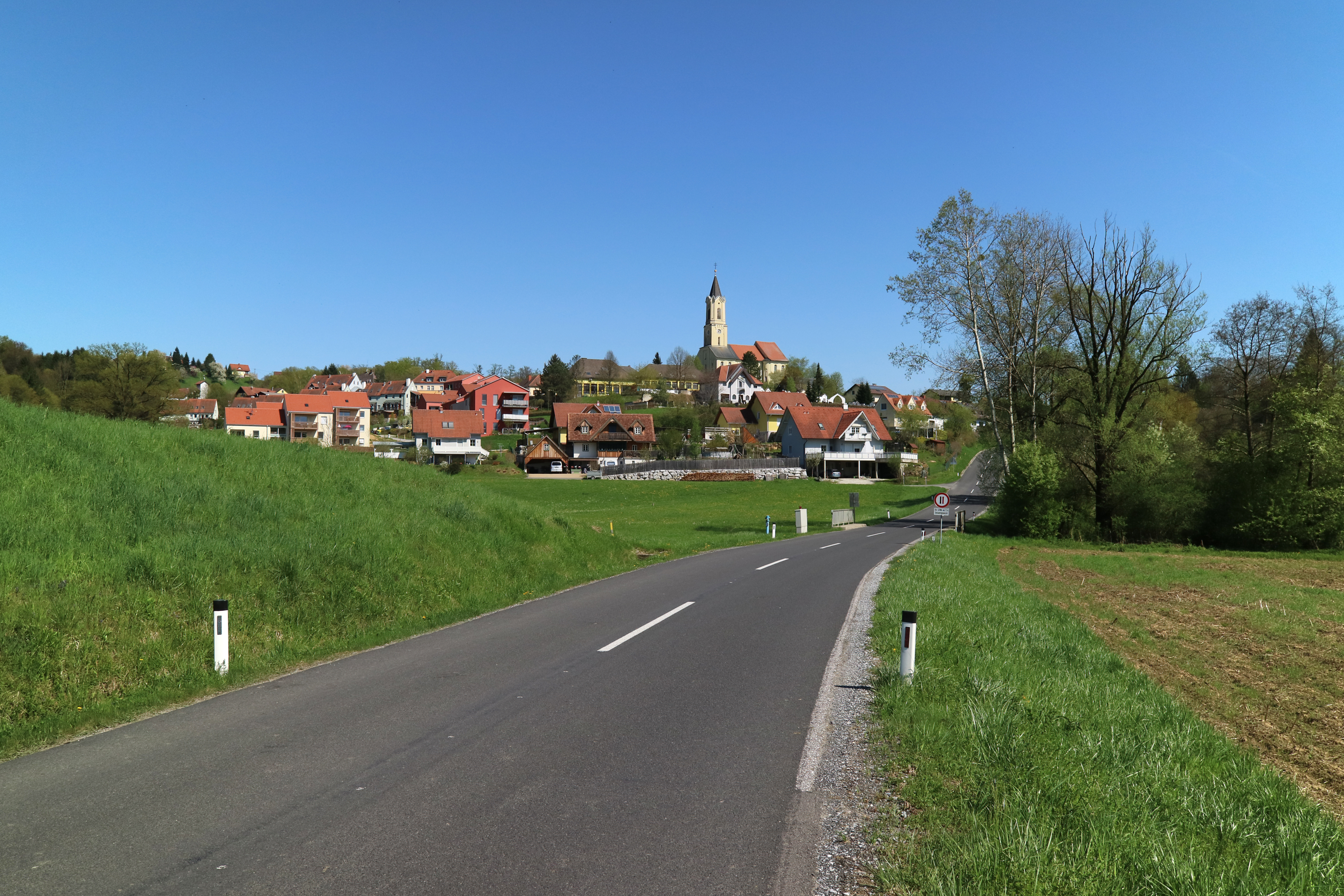 Sankt Josef (Weststeiermark) von Westen